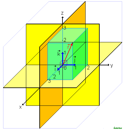 Beispiel für eine Orthonormalbasis im R3